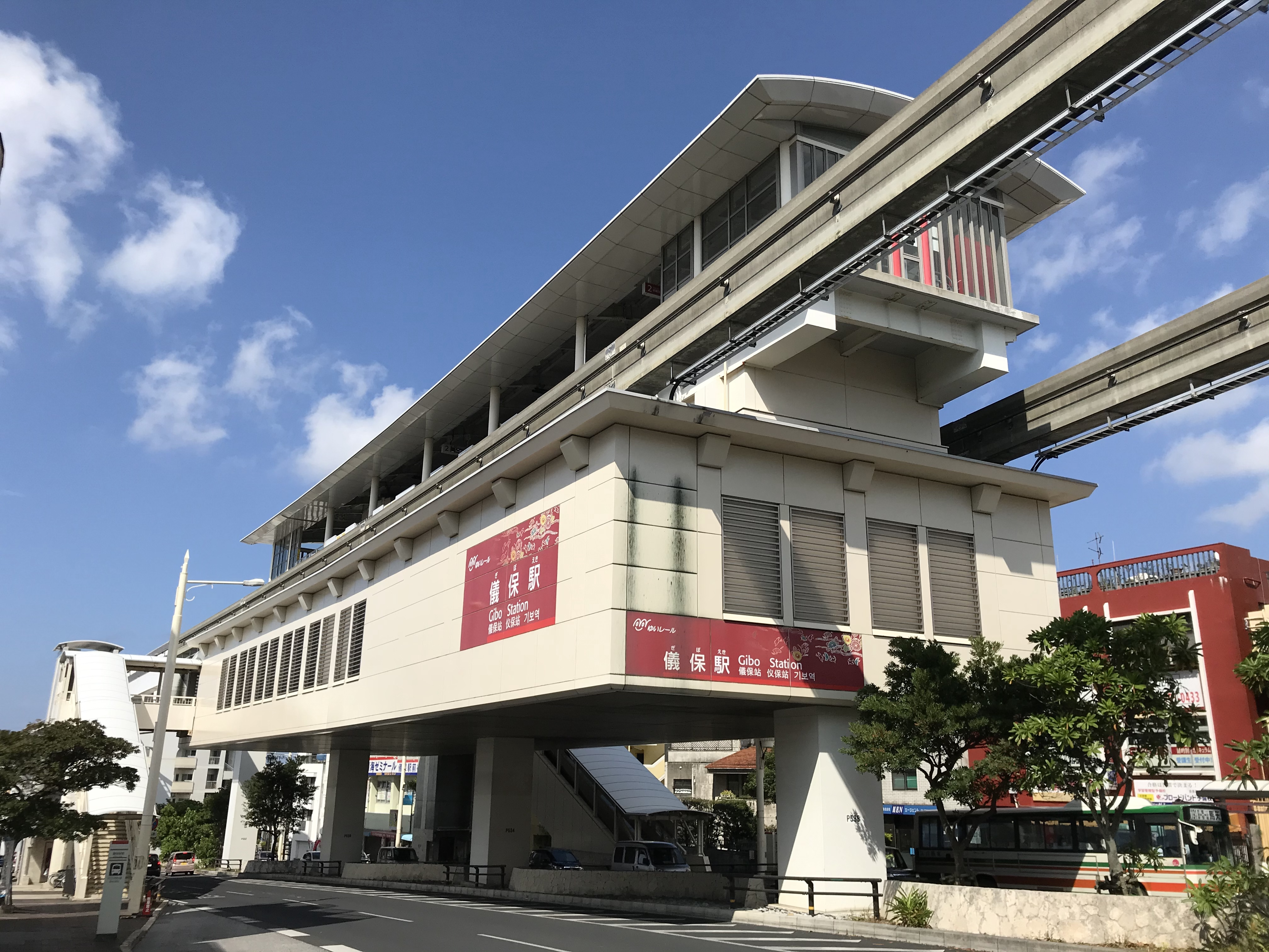 沖縄都市モノレール（ゆいレール）儀保駅